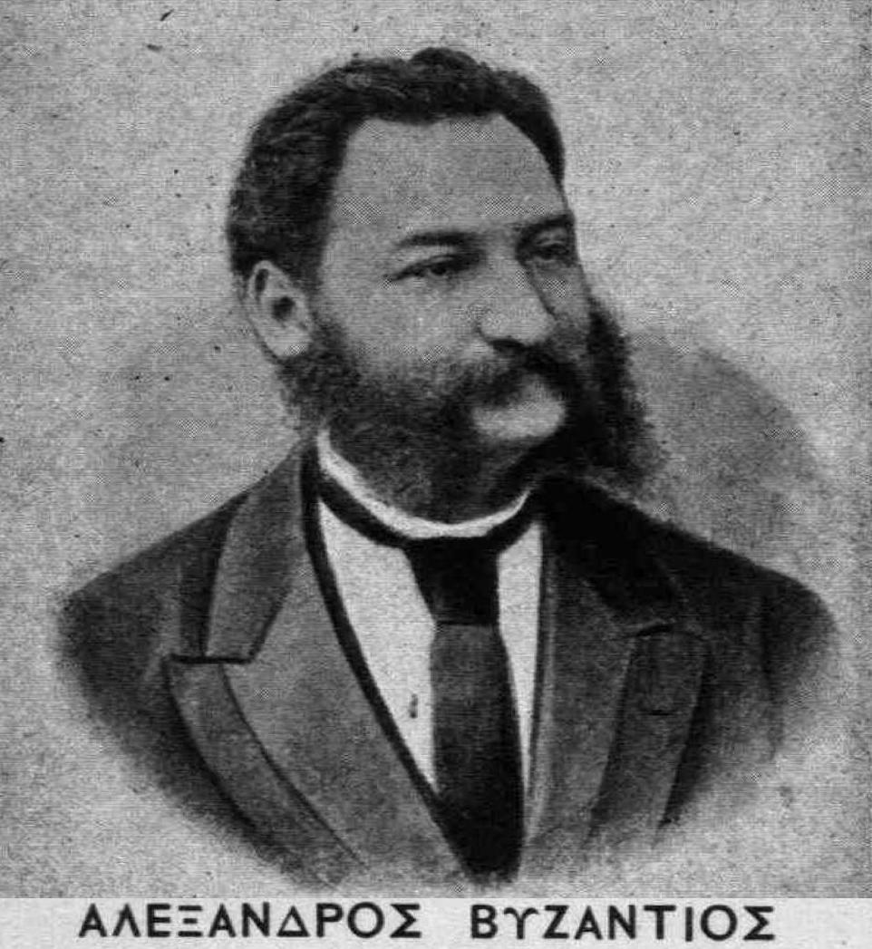 griechischee Schriftsteller, 19. Jahrhundert